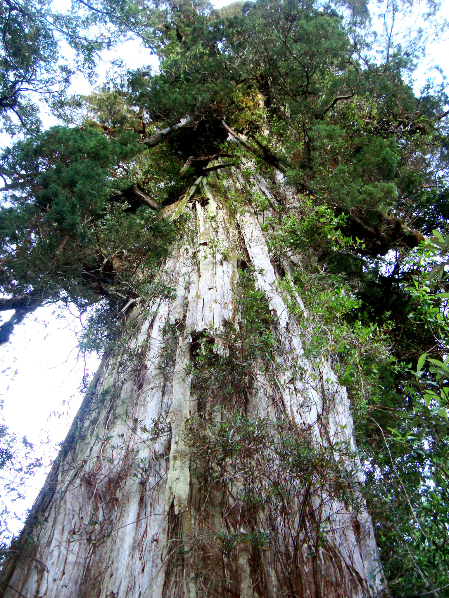 Fitzroya cuppresoides. Reserva costera Valdiviana